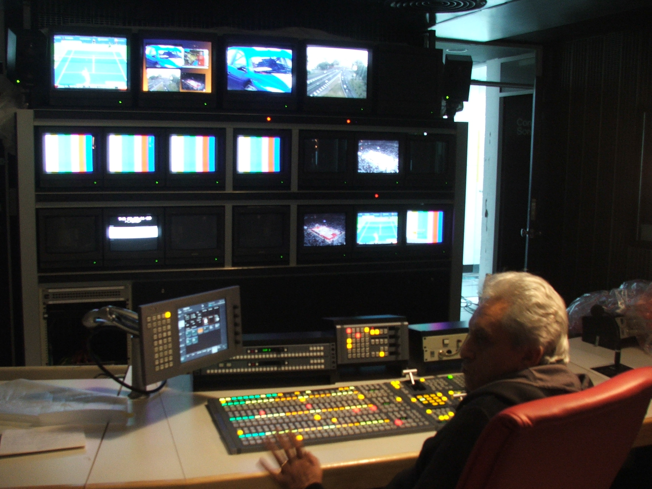 Control del Estudio 2 en etapa de modernización